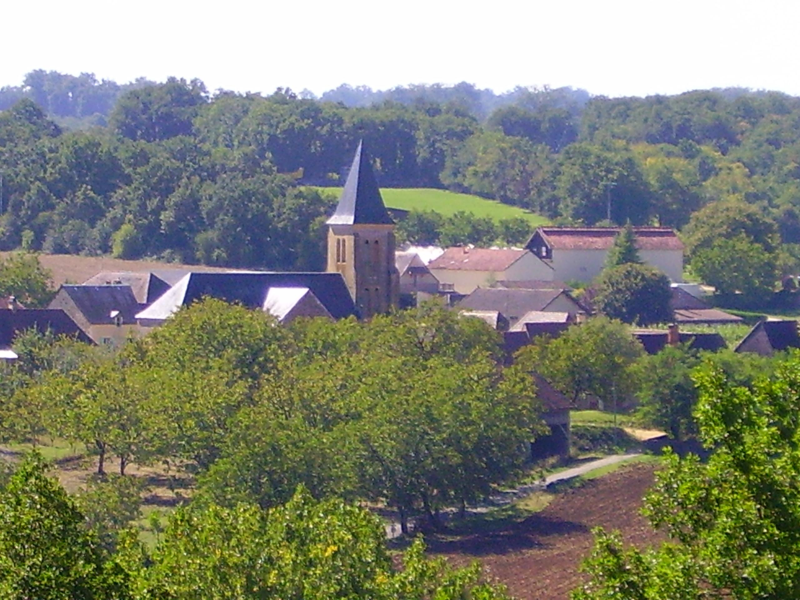 le bourg de Nabirat côté nord